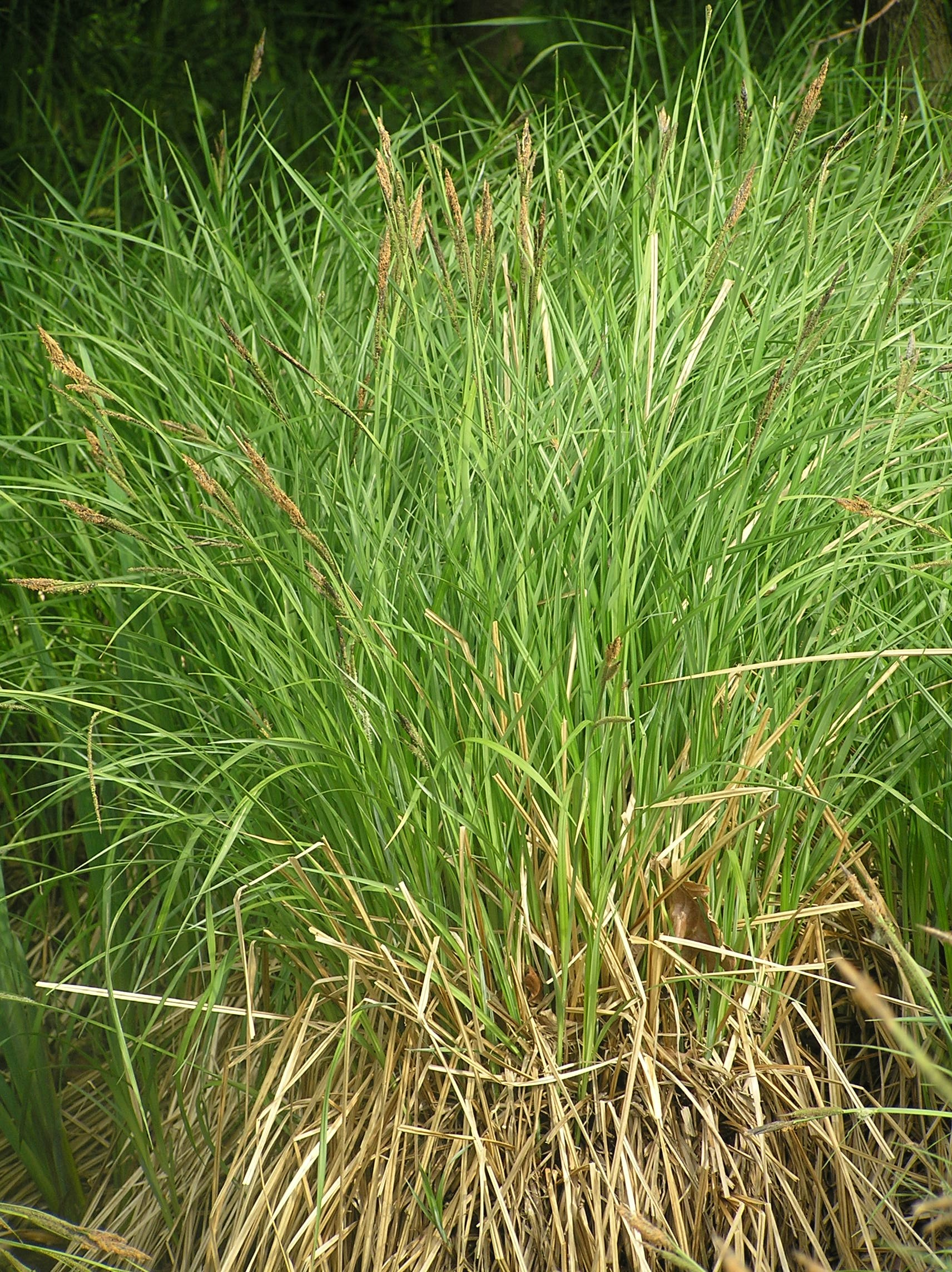 Carex elata, Břeclav, Czech Republic